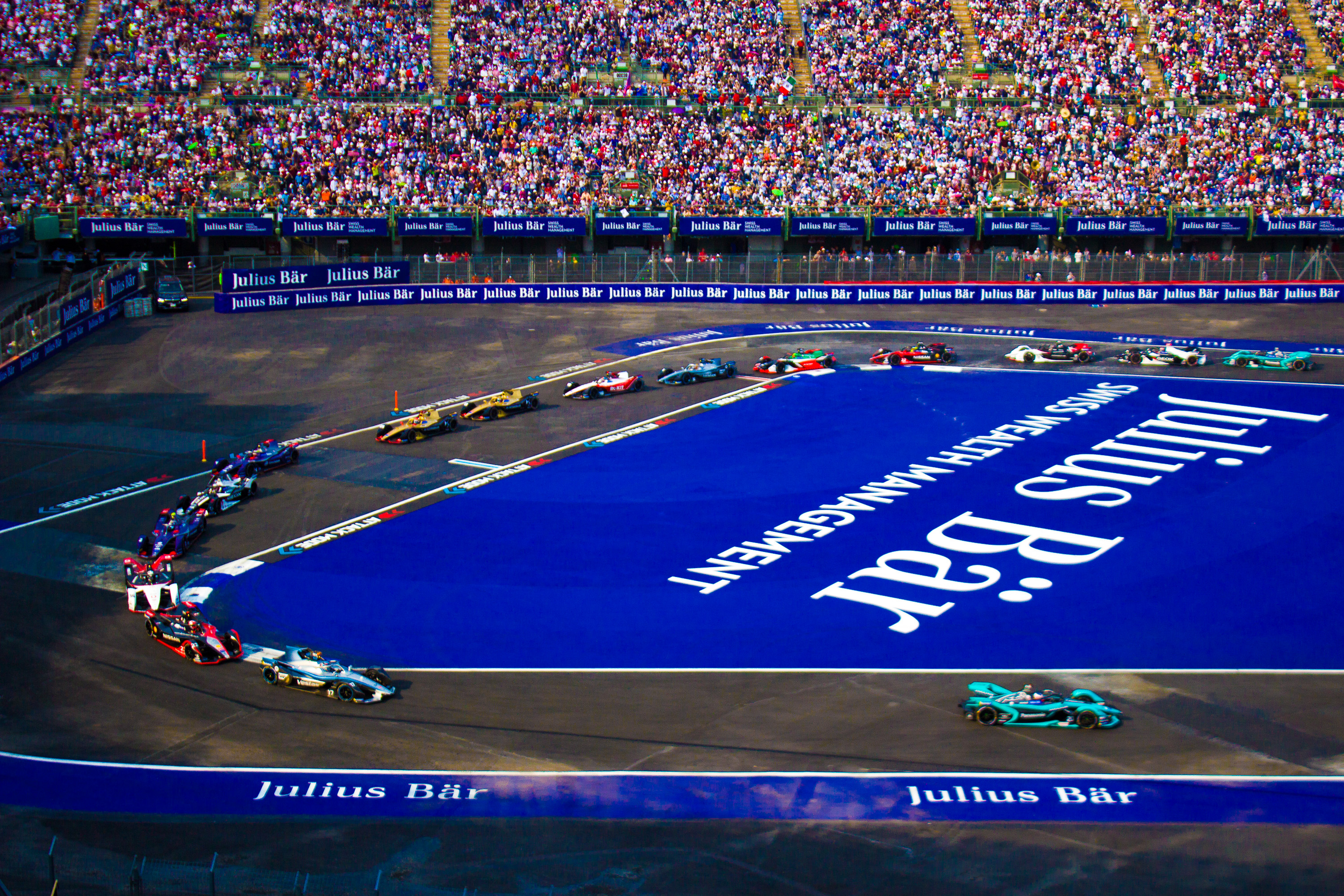 2019-20 FIA Formula E, CBMM Niobium Mexico City E-Prix 2020, Autódromo Hermanos Rodríguez, Ciudad de México, 15 de febrero 2020